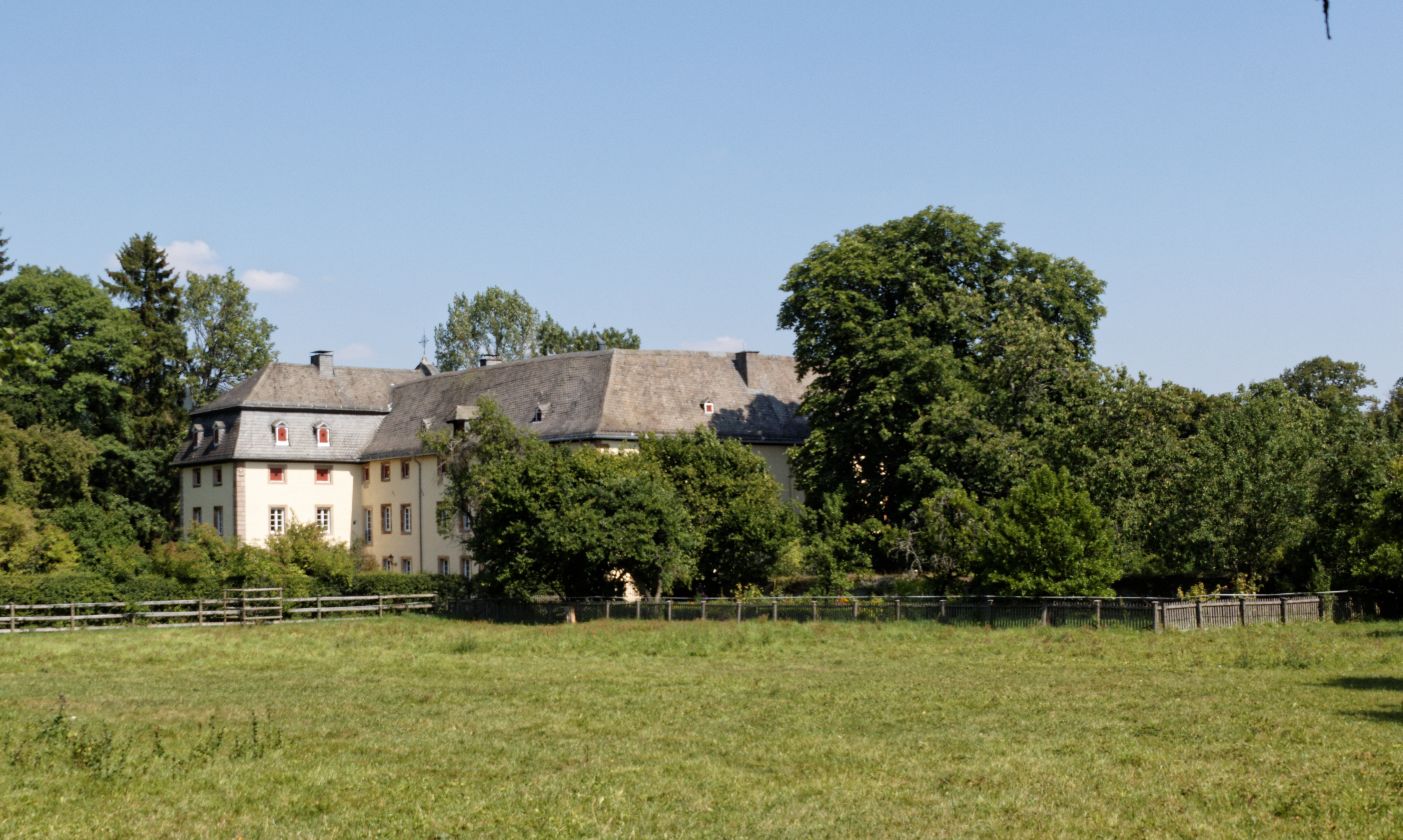 Medebach Kloster GlindfeldThis is a photograph of an architectural monument., no. 0